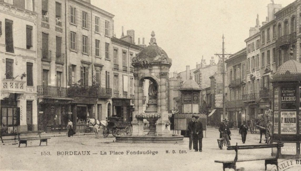 Place avec la fontaine construite en 1865